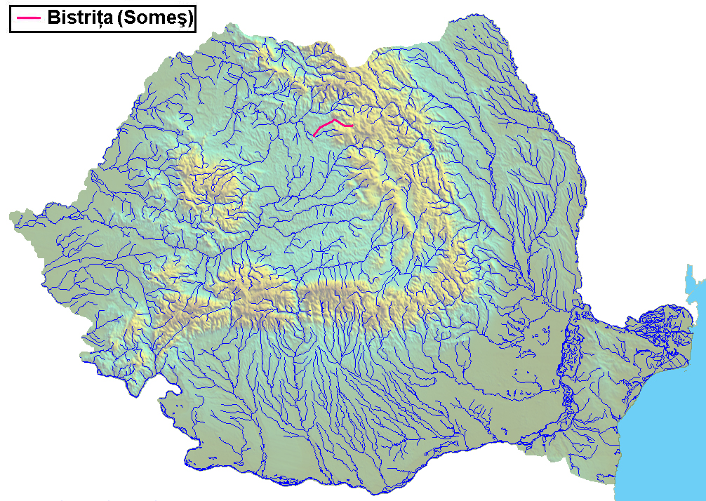 Raul Bistrita